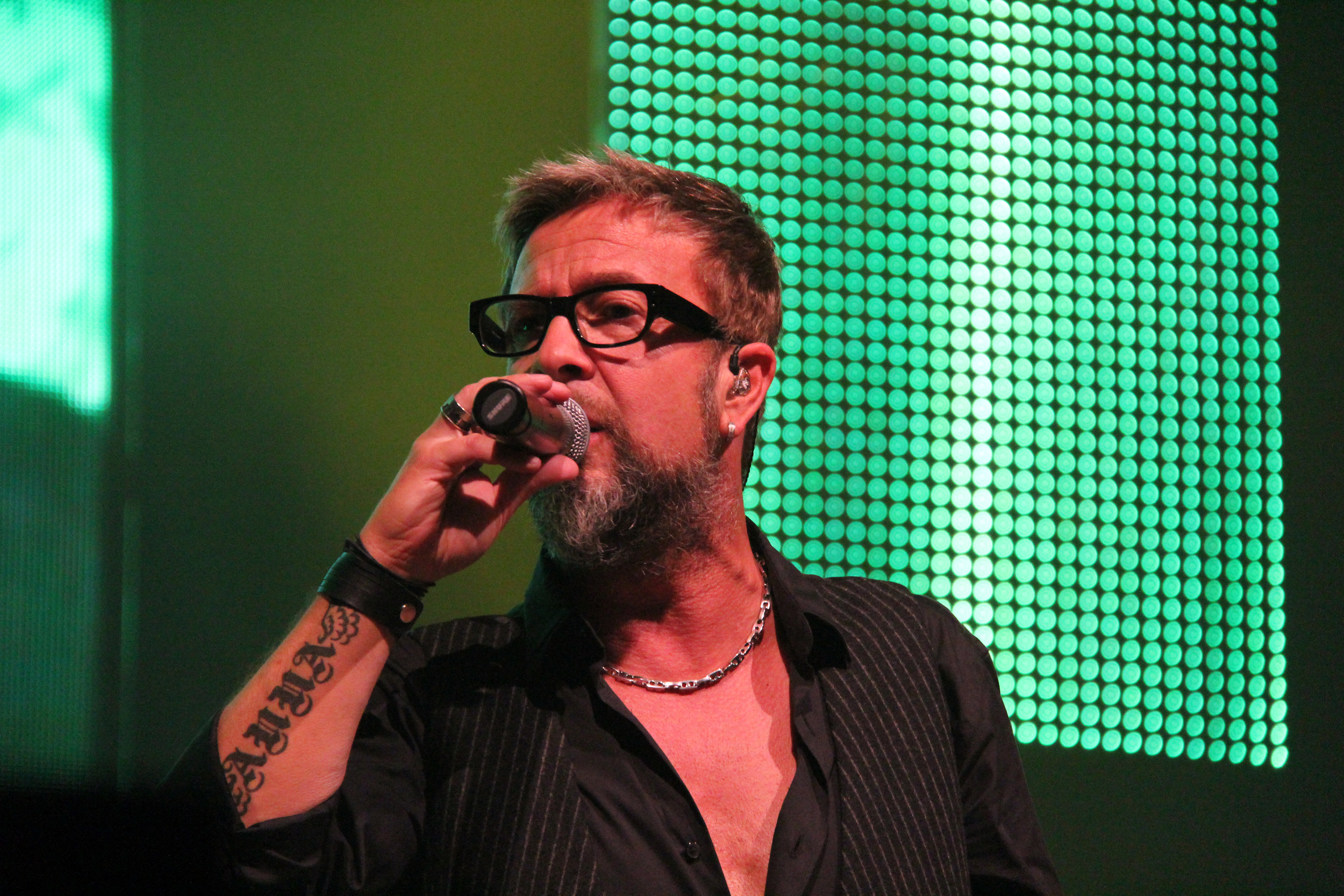 Marco Masini tour 2015 - TORINO 24-04-2015